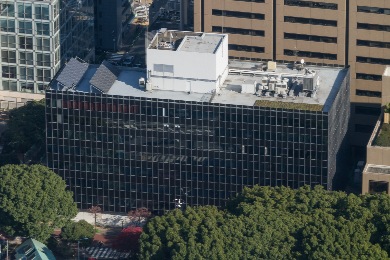 労働委員会会館、東京都港区芝公園。